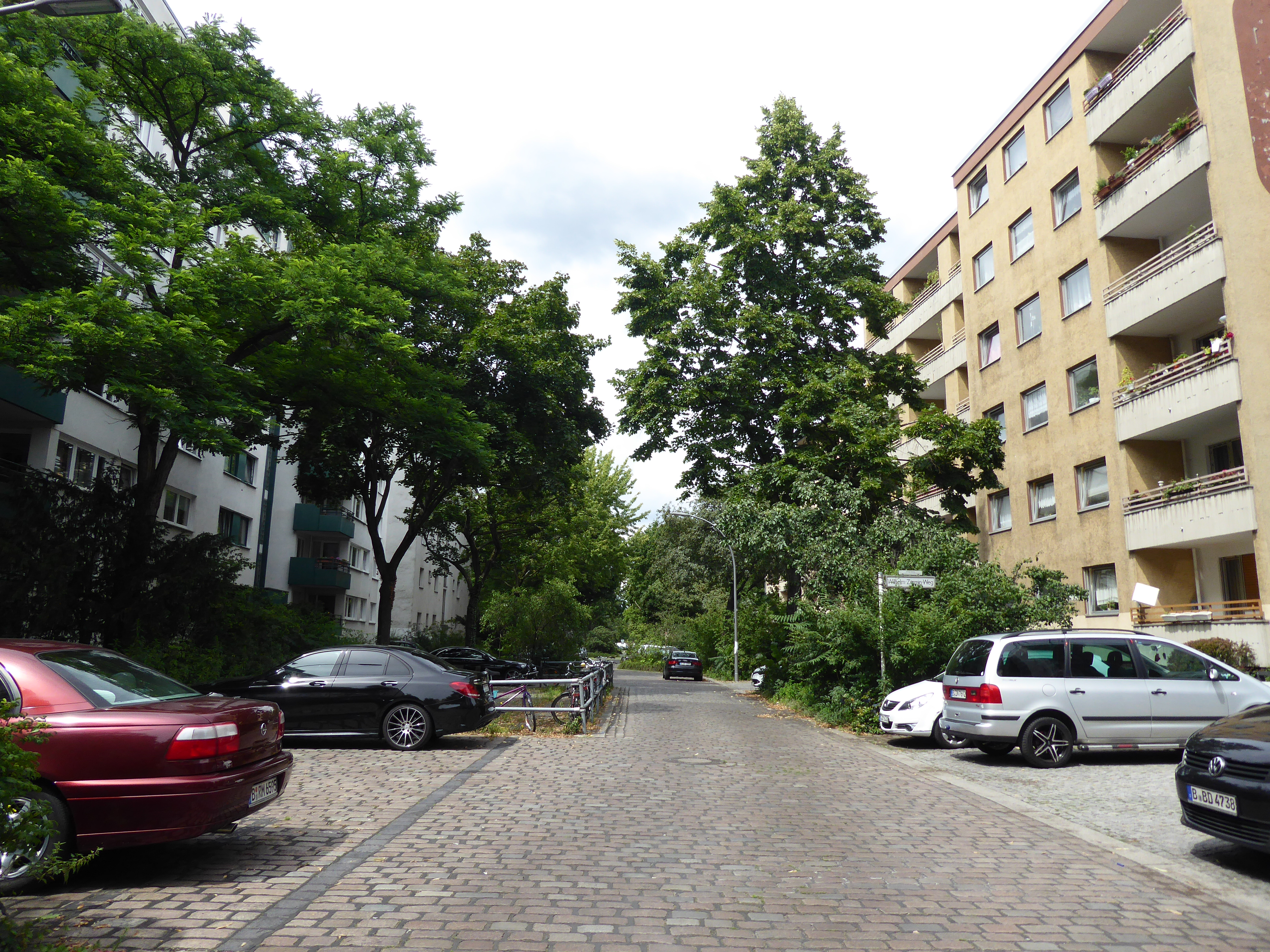 Gesundbrunnen Ackerstraße verkehrsberuhigter Bereich